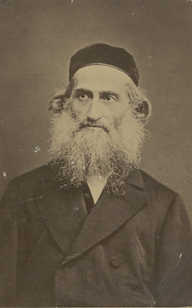 הרב ברוך יצחק ליפשיץ